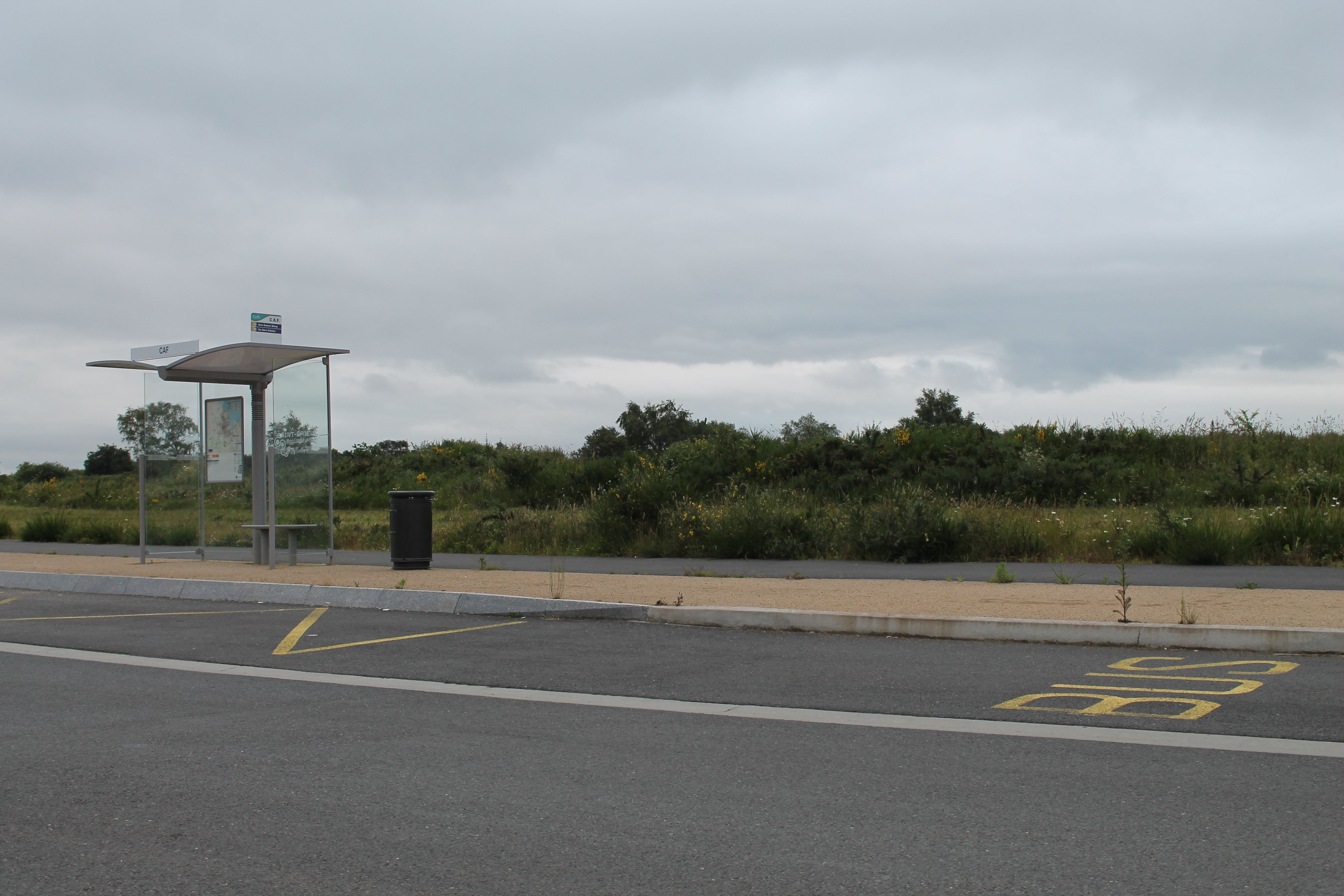 Tronçon TEO - Terminus Ouest